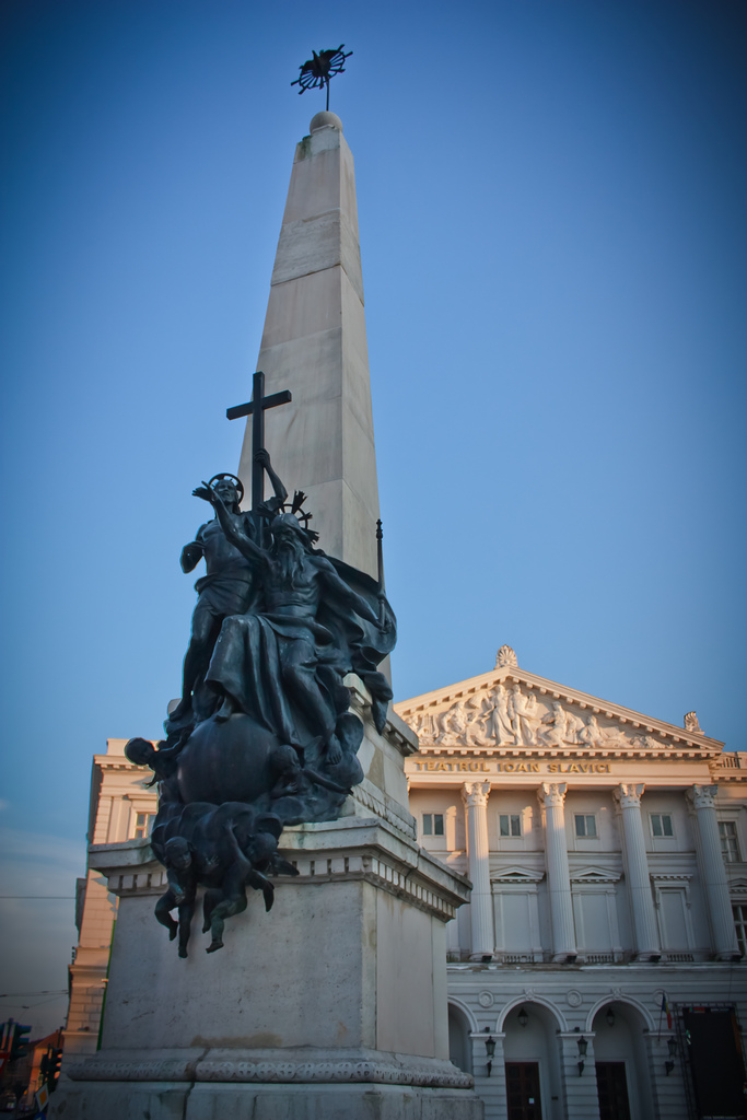 arad - teatrul Ioan Slavici